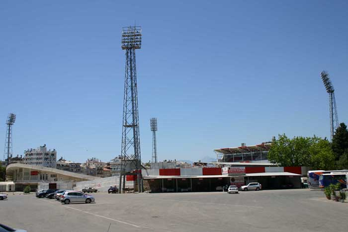 Antalya_Atatürk_Stadium